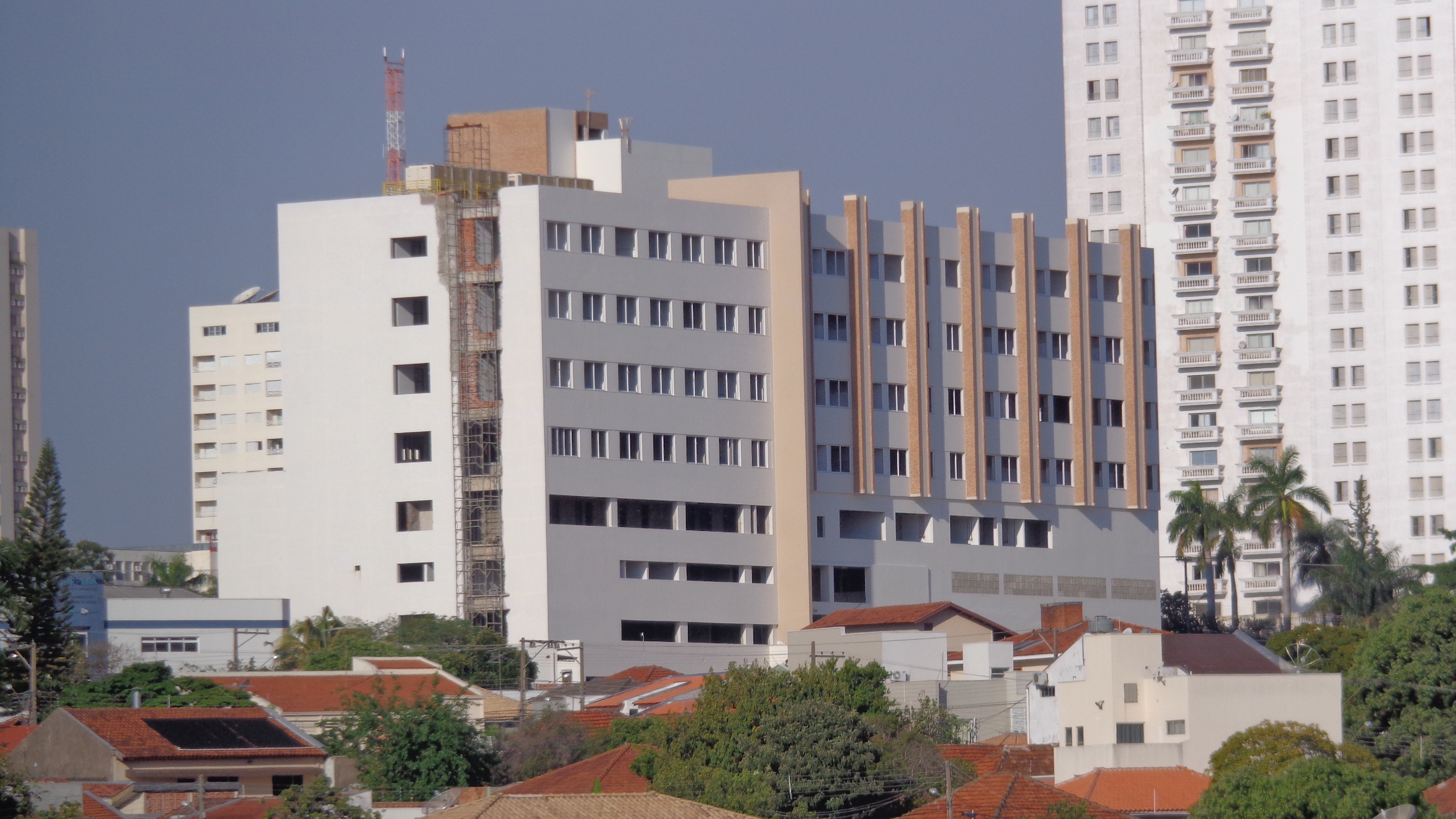 Visão da construção do Hospital Regional